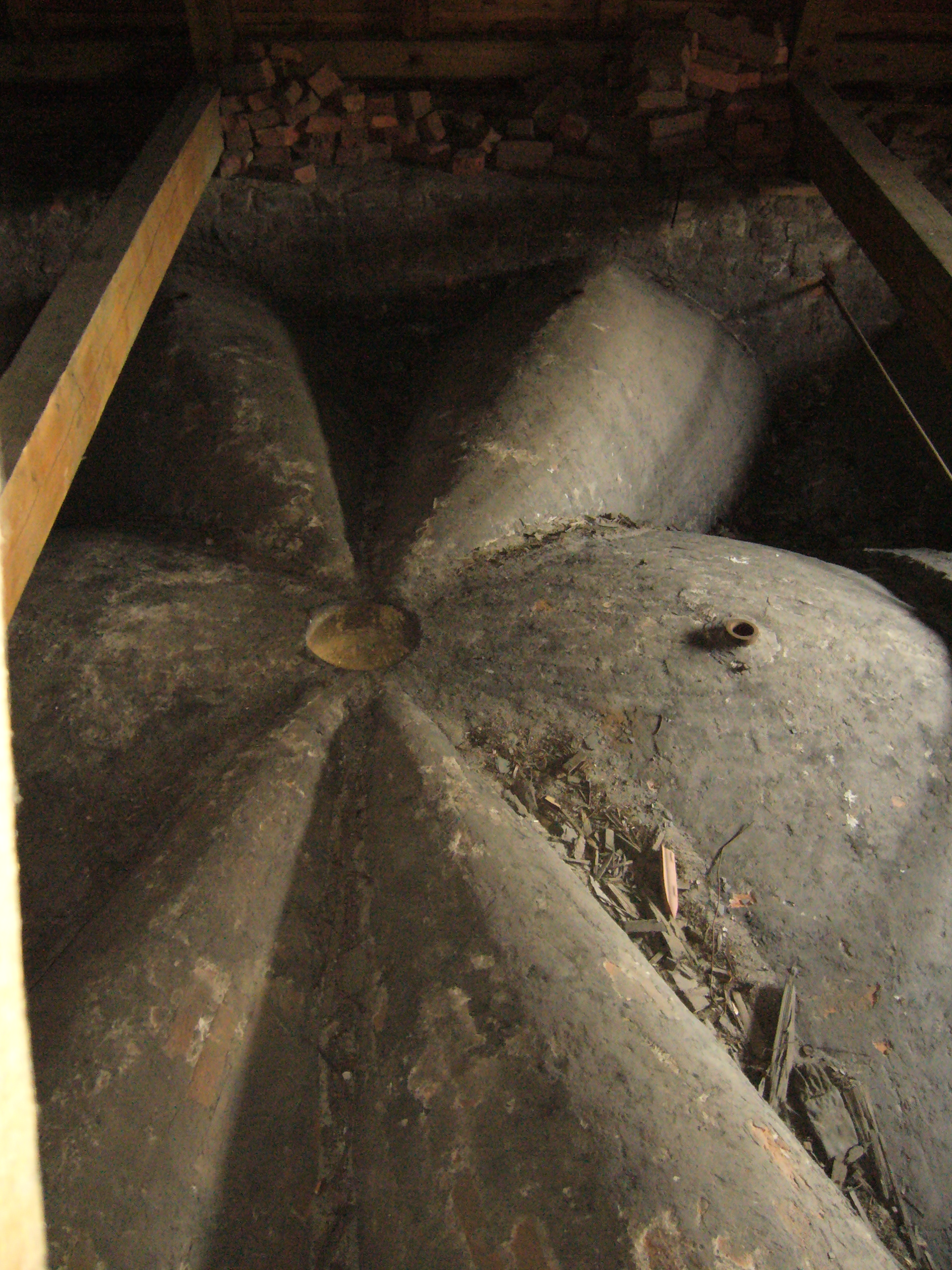 Kaplica zamkowa w Raciborzu. Widok konstrukcji sklepienia z góry, z poddasza kaplicy. Racibórz, woj. Śląskie, Polska.